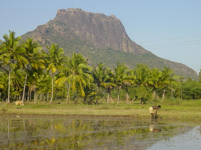 பறம்புமலைச் சாரலில் ஒரு வயல் வெளிக் காட்சி